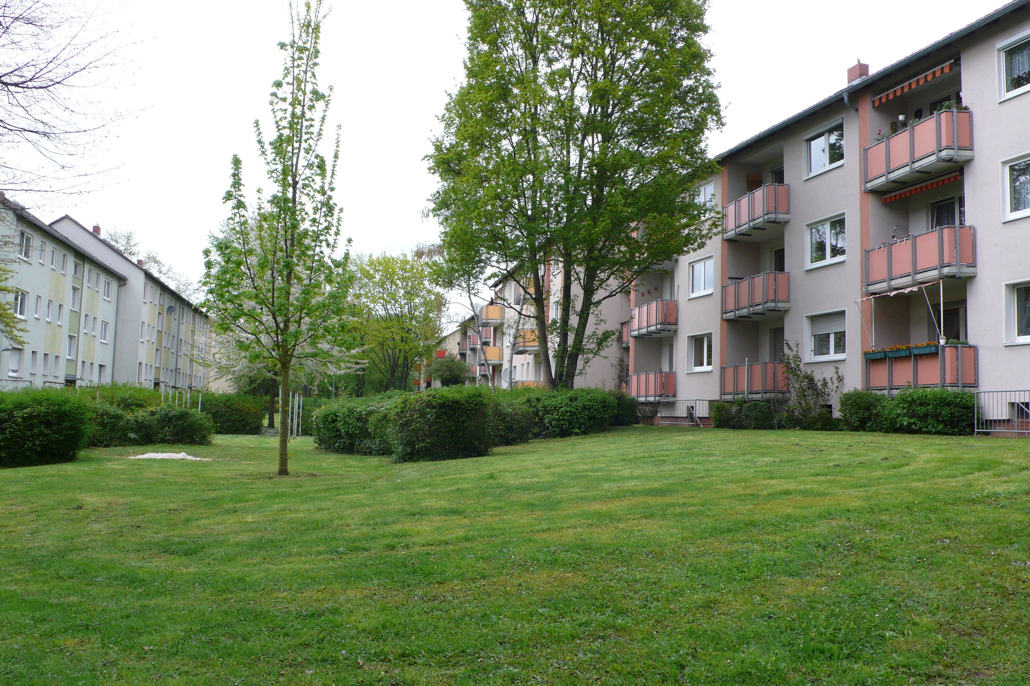 50er Jahre Siedlung in Frankfurt-Eschersheim, Blick nach Norden